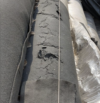 Geotextil degradado precocemente pelo uso de fibras de algodão em sua composição